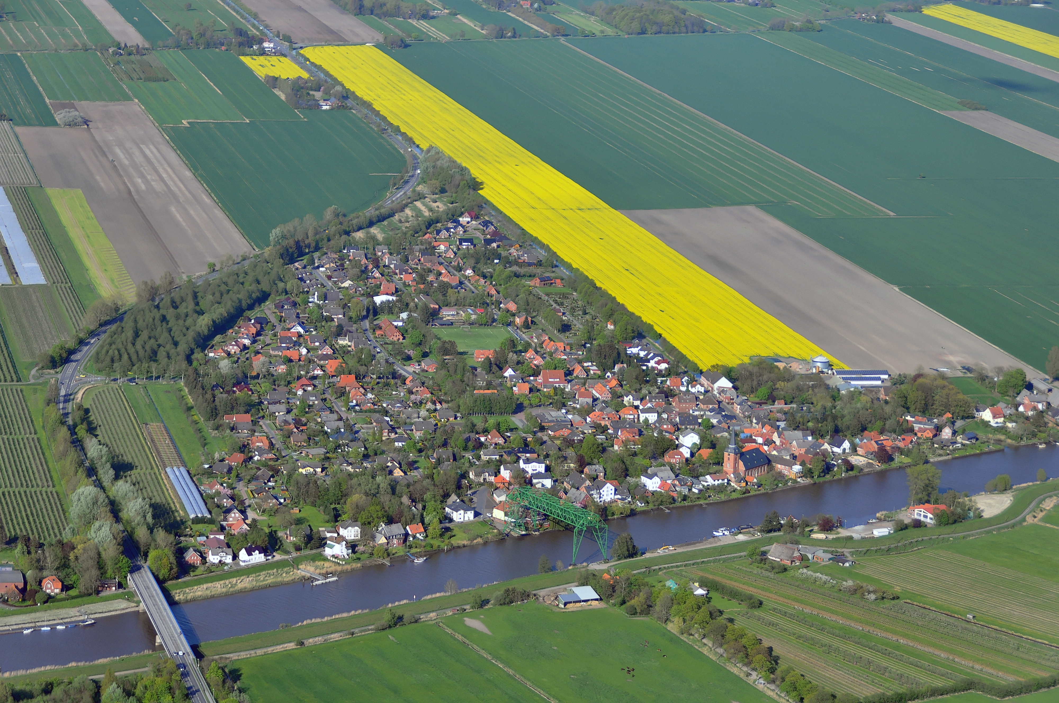 Luftbilder von der Nordseeküste 2012-05